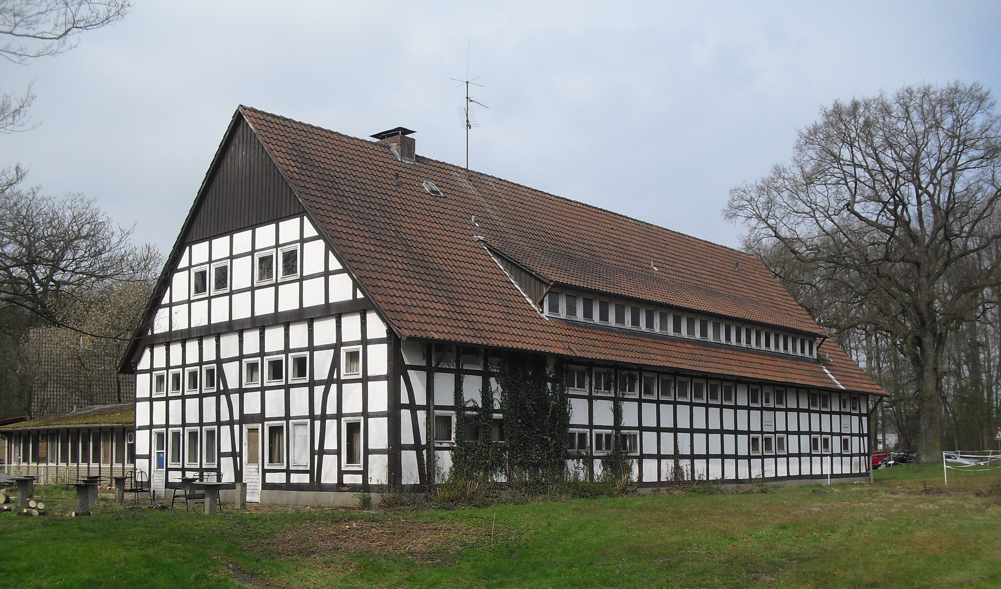 Alter Beckhof in Sennestadt This is a photograph of an architectural monument.